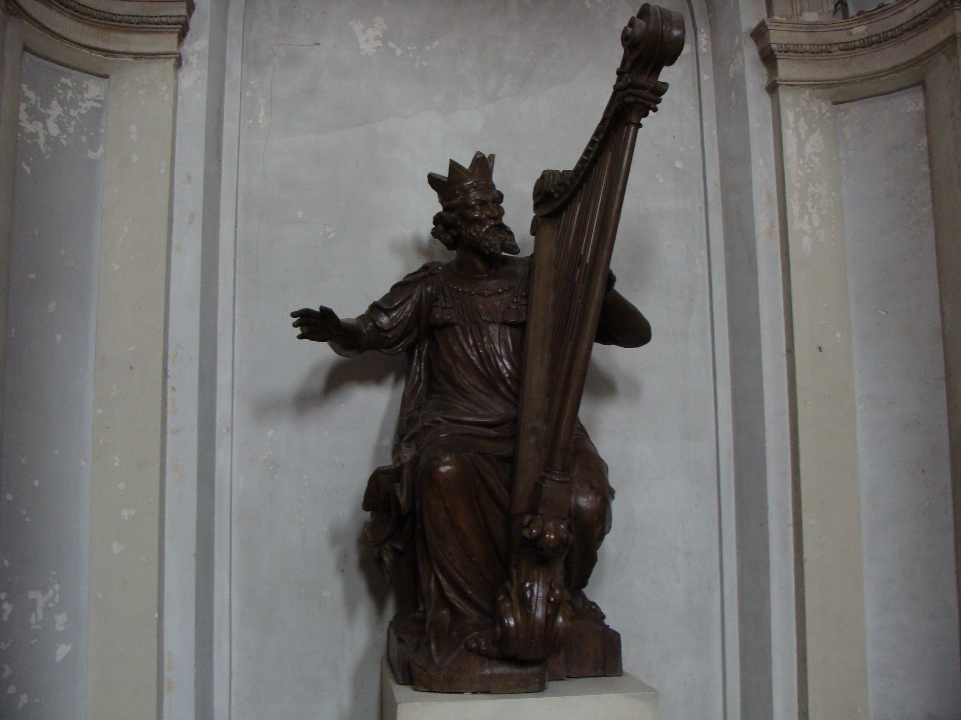 Le_Roi_David_- Basilique_Notre-Dame_de_Boulogne-_sur-Mer